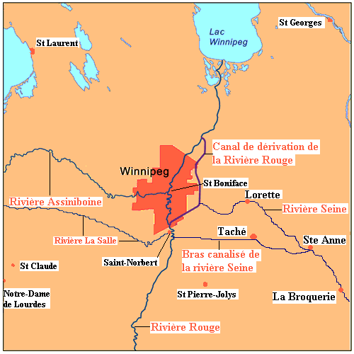 Carte représentant les principaux cours d'eau autour de Winnipeg et les principales communautés franco-manitobaines.